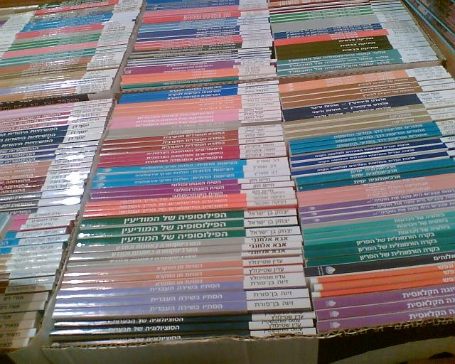 מקצת מספרי סדרת אוניברסיטה משודרת, בדוכן "משרד הביטחון - ההוצאה לאור" בשבוע הספר העברי. צילם דוד שי.